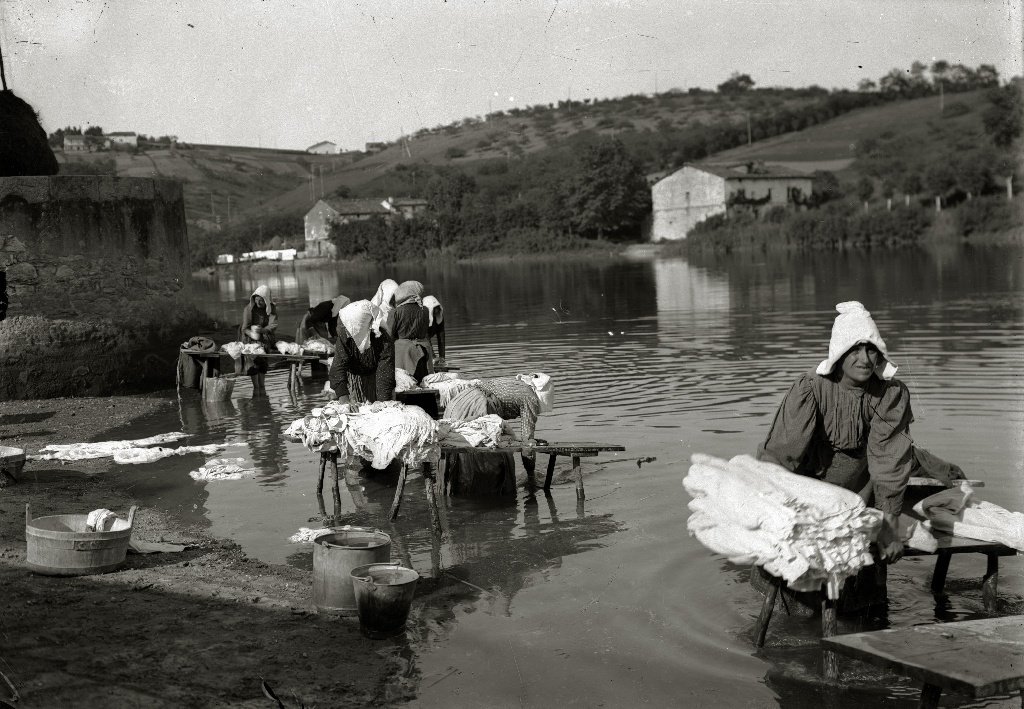 Emakumeak Urumean arropa garbitzen, Donostiako Loiolan, 1920 baino lehen